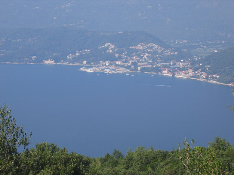 Зеленика (аутор Никострат Саронски)